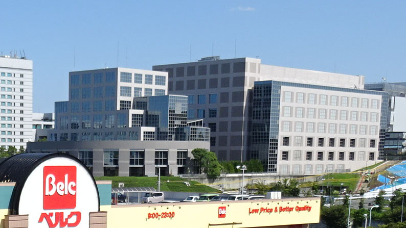 三菱東京UFJ銀行多摩ビジネスセンター（東京都多摩市）